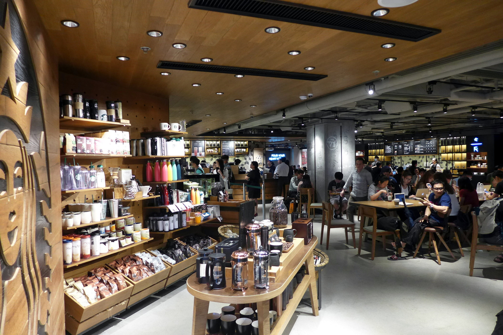 Gala Place Basement Starbucks